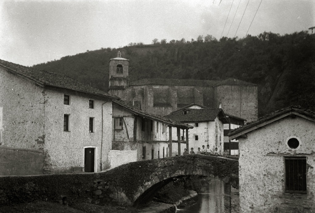 Título original: Vista de la localidad de Zaldibia (1/2) Localización: Zaldivia (Guipúzcoa)